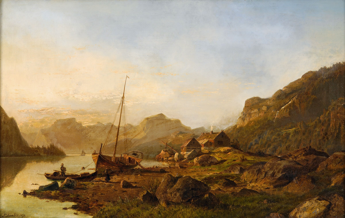 Sonnenaufgang im Fjord. Signiert. Datiert 1871